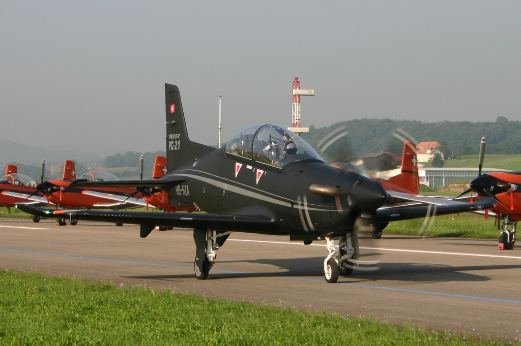 Pilatus PC-21 au roulage Payerne LSMP